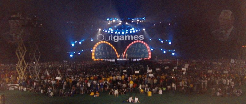 Cérémonie d'ouverture des OutGames Montréal. 29 juillet 2006.